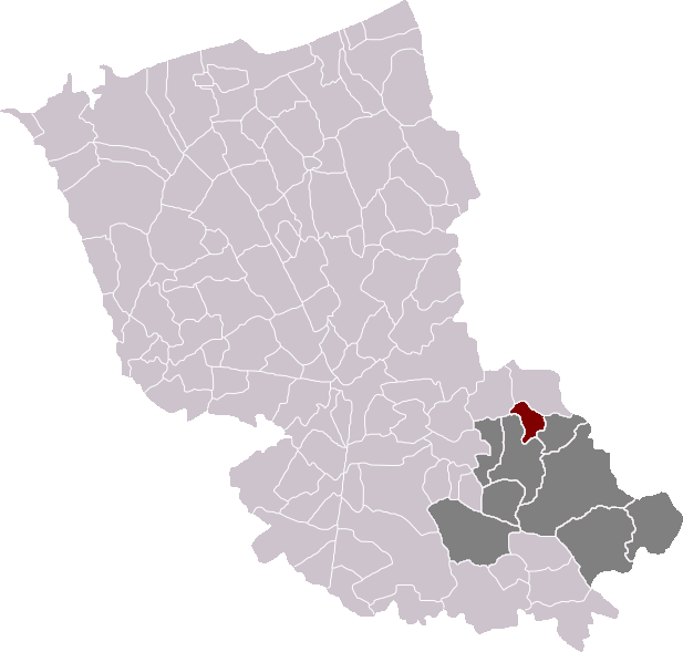 Locatie gemeente Berten in arrondissement Duinkerke. Zelfgemaakt. Location of Berthen municipality in the arrondissement of Dunkirk. Self made. Localisation de la commune de Berthen dans l'arrondissement de Dunkerque. Fait moi-même.